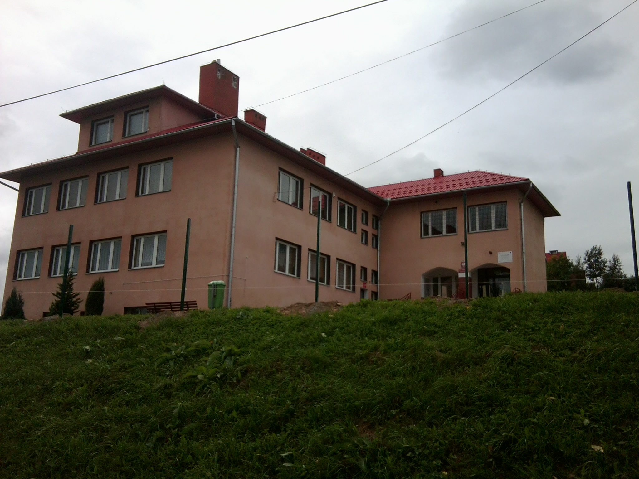 Szkoła podstawowa w Długołęce-Świerkli